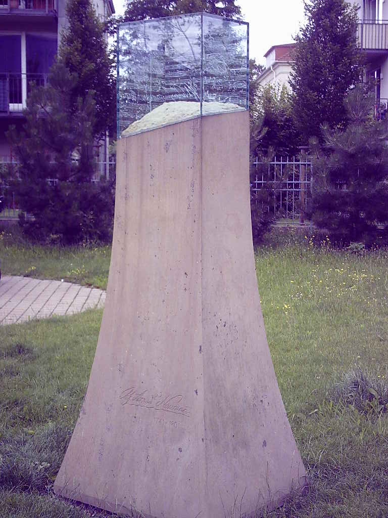 J.G.Naumann memorial